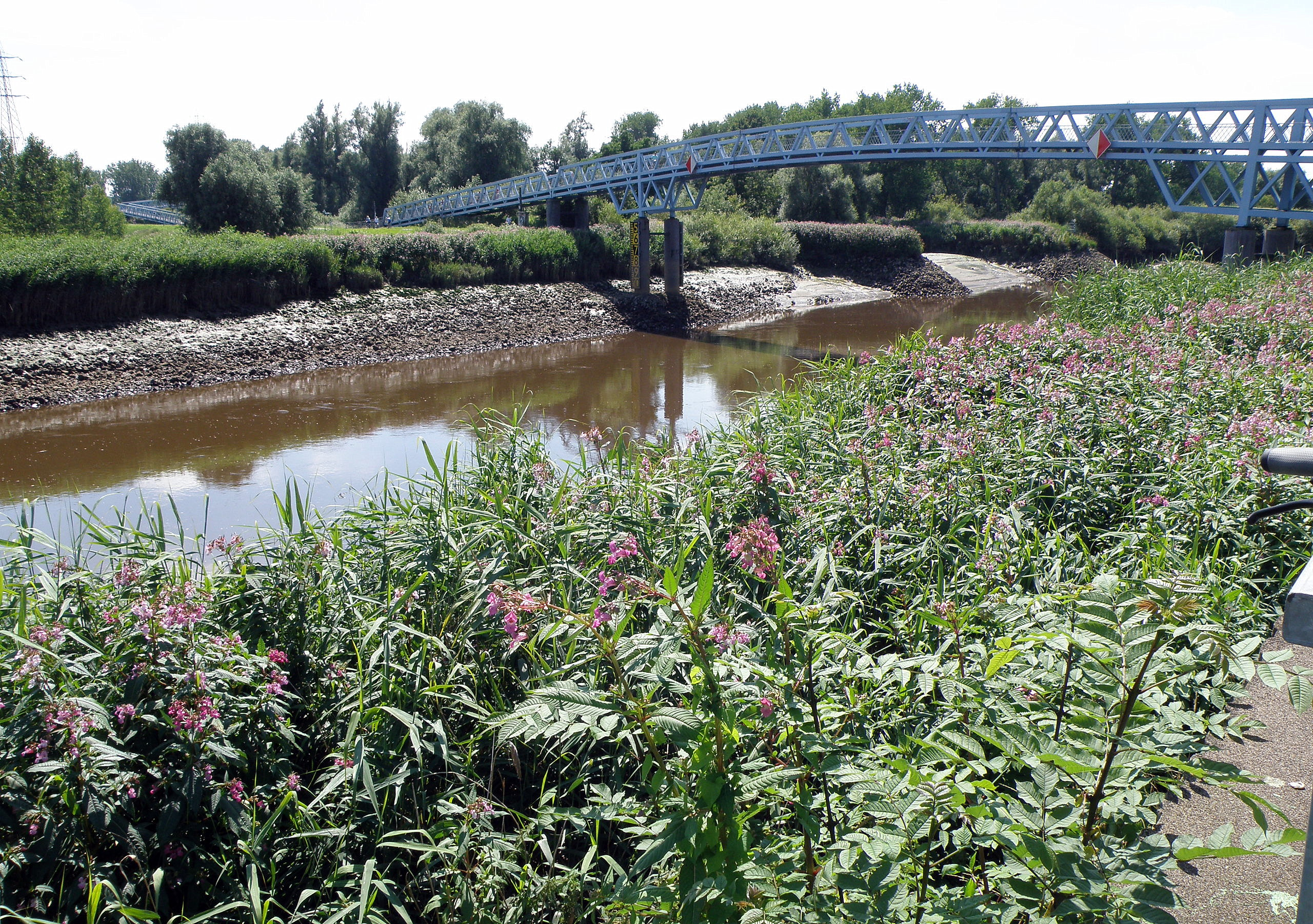 Rumst (prov. Antwerpen). Voetbrug (of fietsbrug) over de rivier de Nete. Overzijde gelegen in Walem (gem. Mechelen). Links, de iets verderop gelegen brug over de Dijle.